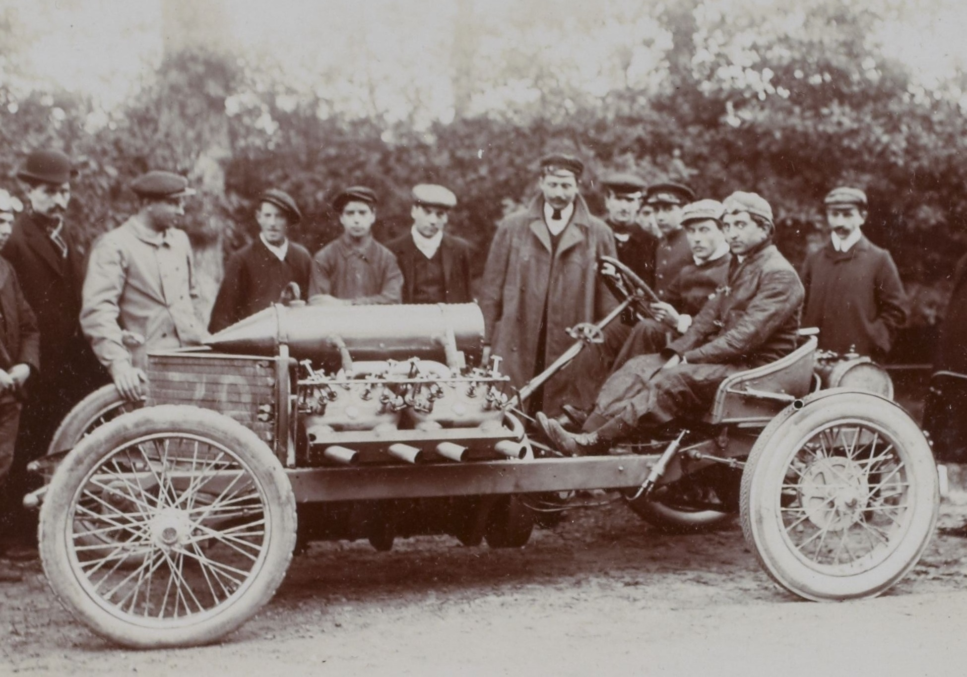 [Collection Jules Beau. Photographie sportive] : T. 32. AnnÃ©e 1906 / Jules Beau : F. 47. [KilomÃ¨tre lancÃ©, Dourdan, 21 octobre 1906]